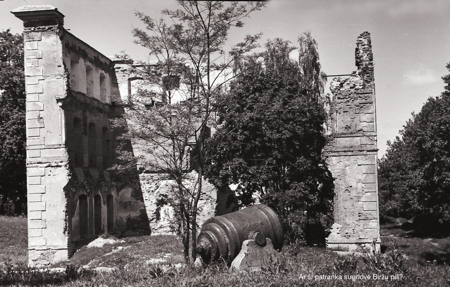 Biržų pilies griuvėsiai 1954 m. birželio mėn. Foto Bronius Lazdynas.